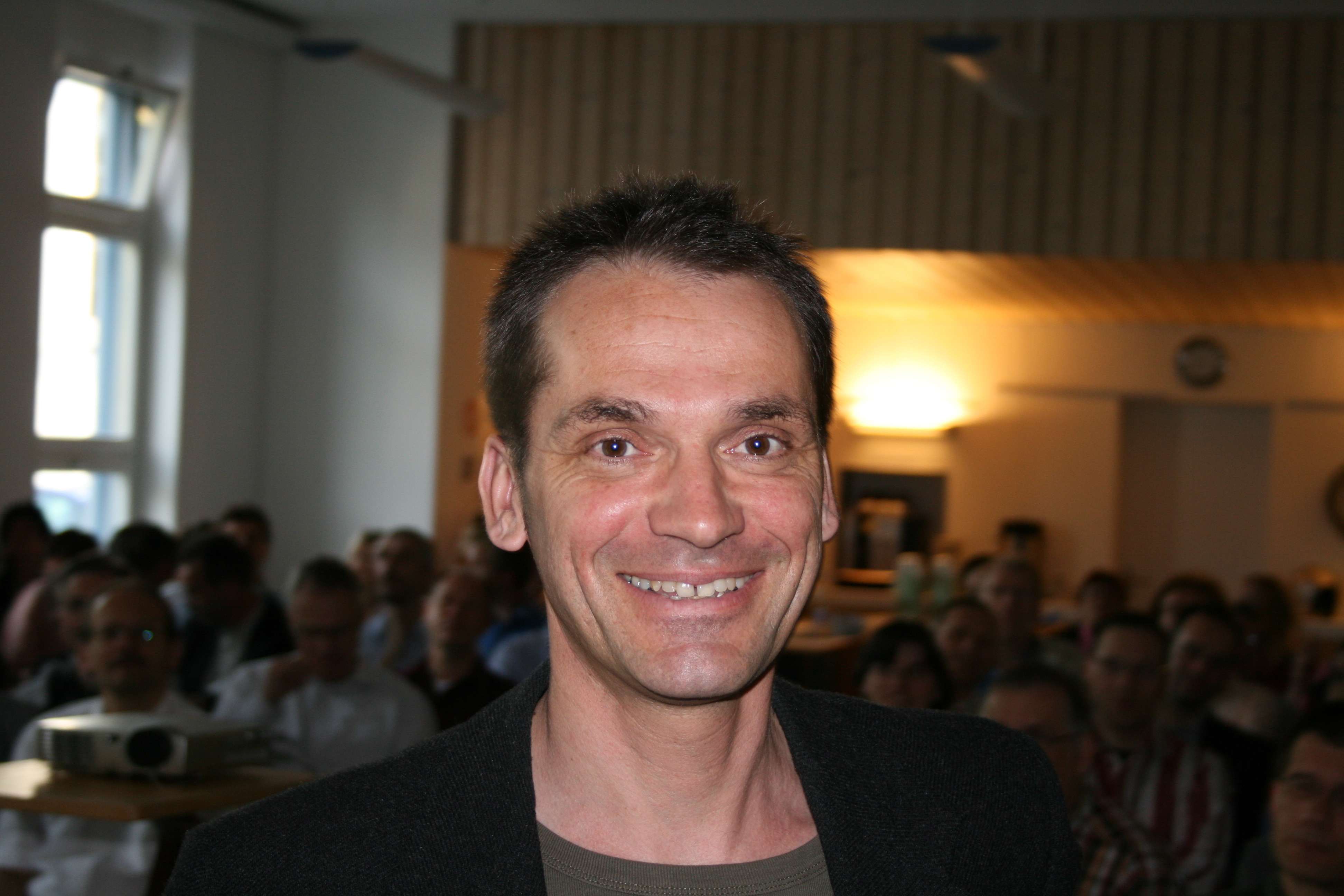 Philippe Woodtli, auf dem Foto: Leiter der Stabsstelle Theologie&Recht der Reformierten Landeskirche Aargau; heute: Geschäftsleiter des SEK